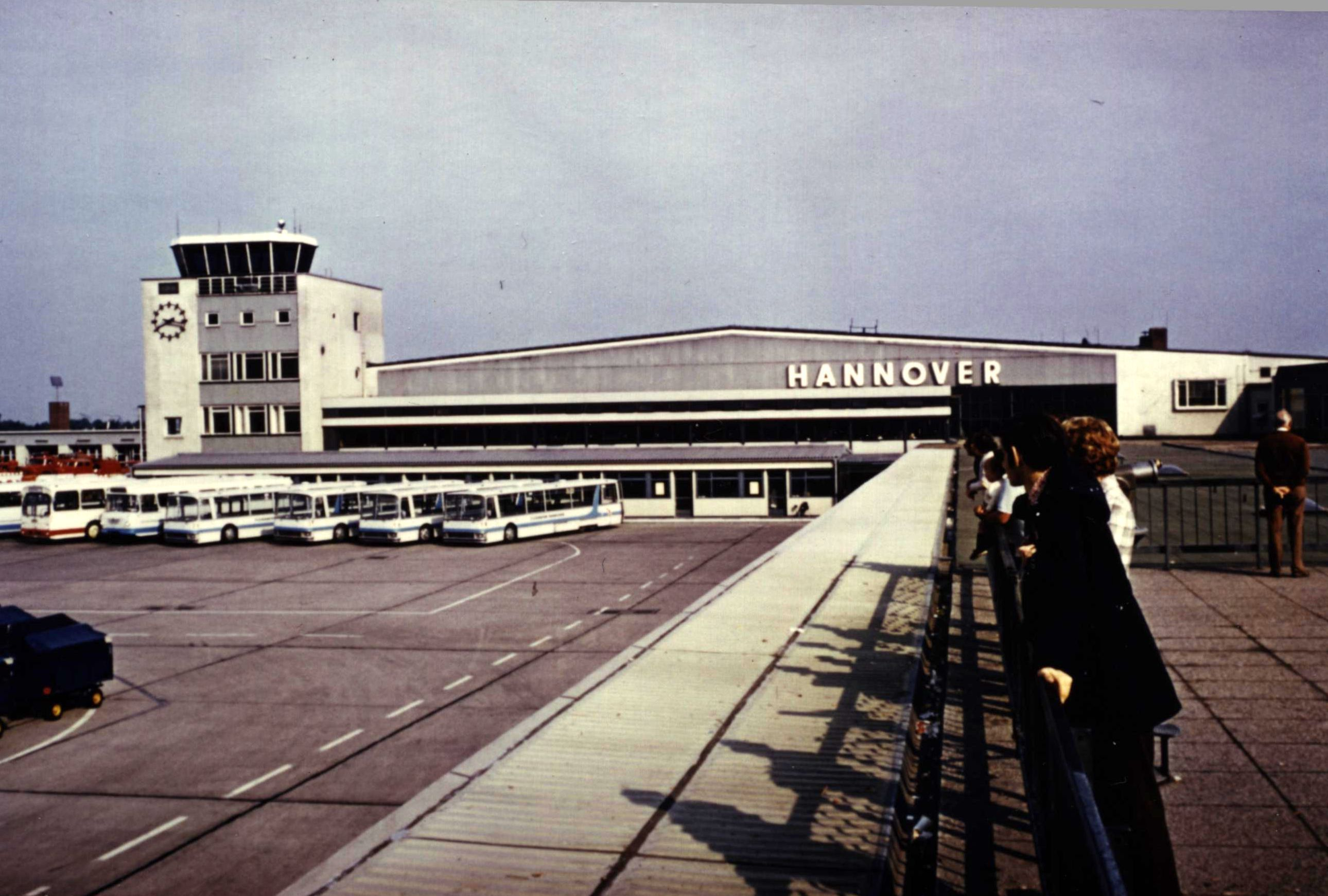 Der Flughafen Hannover-Langenhagen im Jahr 1970. Blick von der Aussichtsterasse auf das Vorfeld mit Zubringerbussen. Links der Kontrollturm, rechts die Abfertigungshalle.